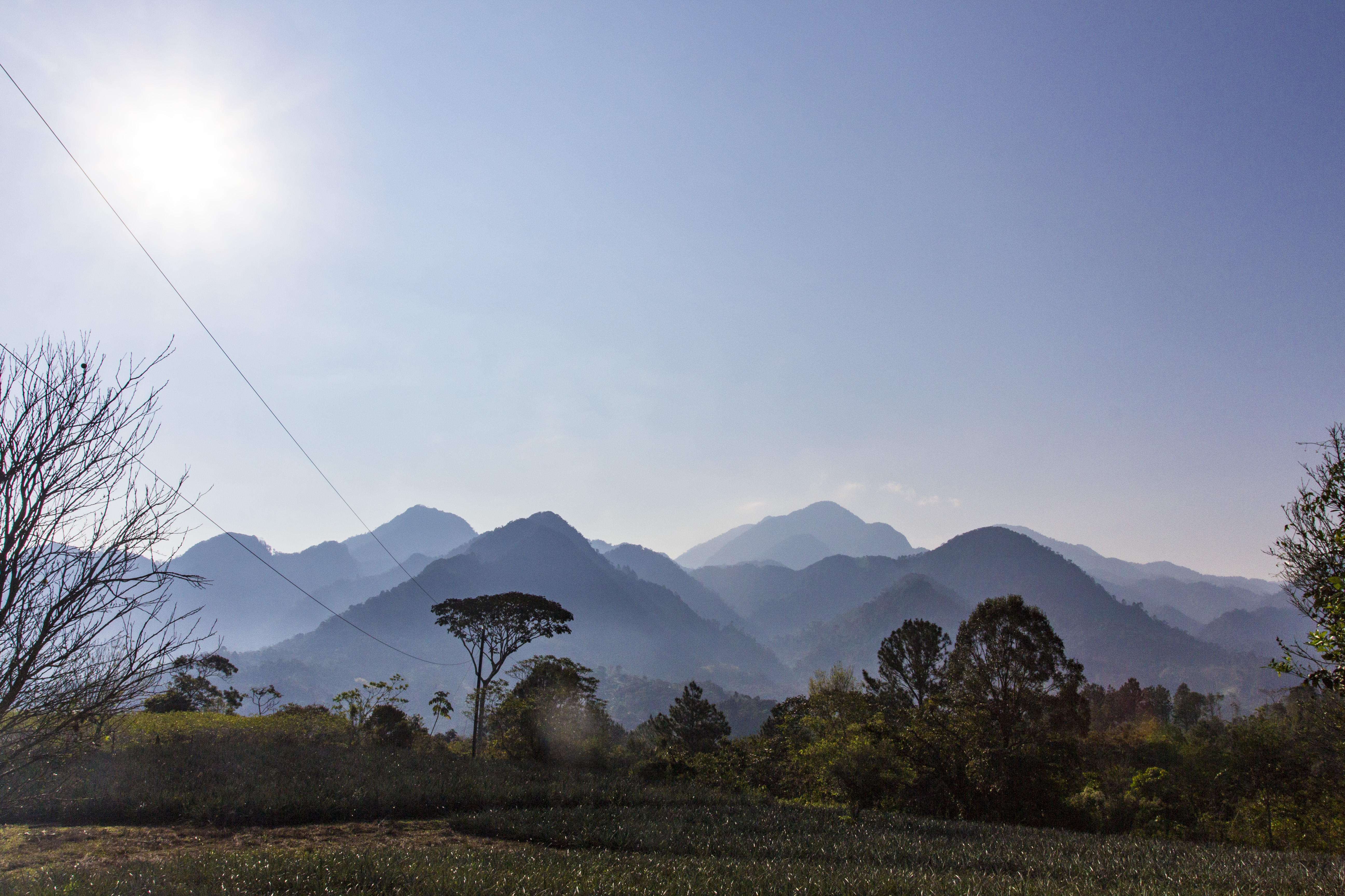 Parque Nacional Cerro Azul Meambar, 18 de Feb. 2017